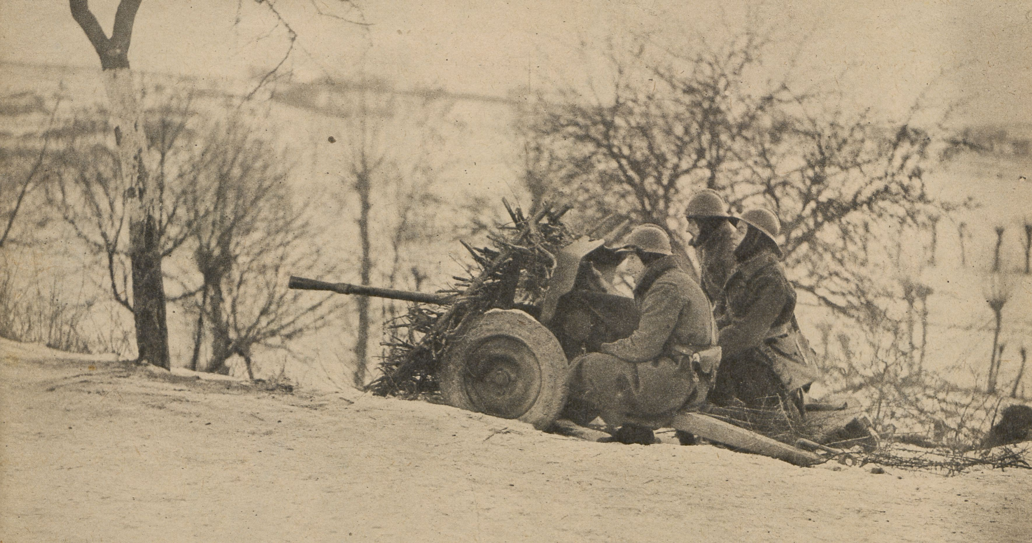 Les servants d'un canon antichars sont à leur emplacement de combat, en arrière des petits postes. Ils ont mis à profit des arbustes, qu'ils ont épaissis artificiellement avec des branchages, pour se confondre avec le paysage et éviter ainsi de se silhouetter sur la neige. Canon Mle 1934 de 25mm en service pendant l'hiver 1940.